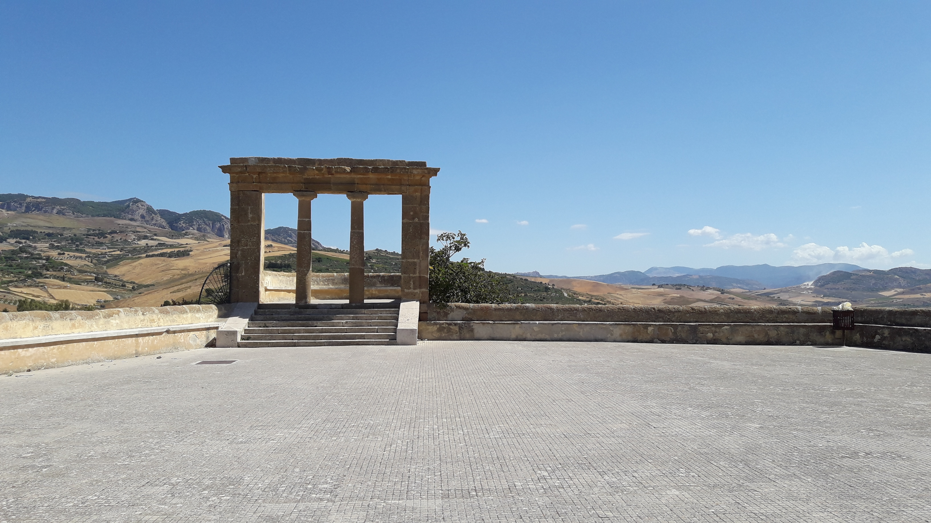 piazza del Belvedere, Sambuca di Sicilia